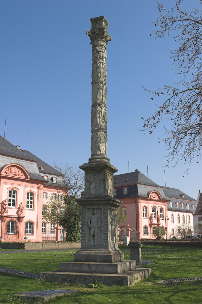 Die Große Mainzer Jupitersäule, ein in der zweiten Hälfte des ersten Jahrhunderts in Mogontiacum (dem heutigen Mainz) errichtetes ziviles Denkmal zu Ehren des römischen Gottes Jupiter. Reproduktion vor dem Landtag Mainz (Deutschhaus)